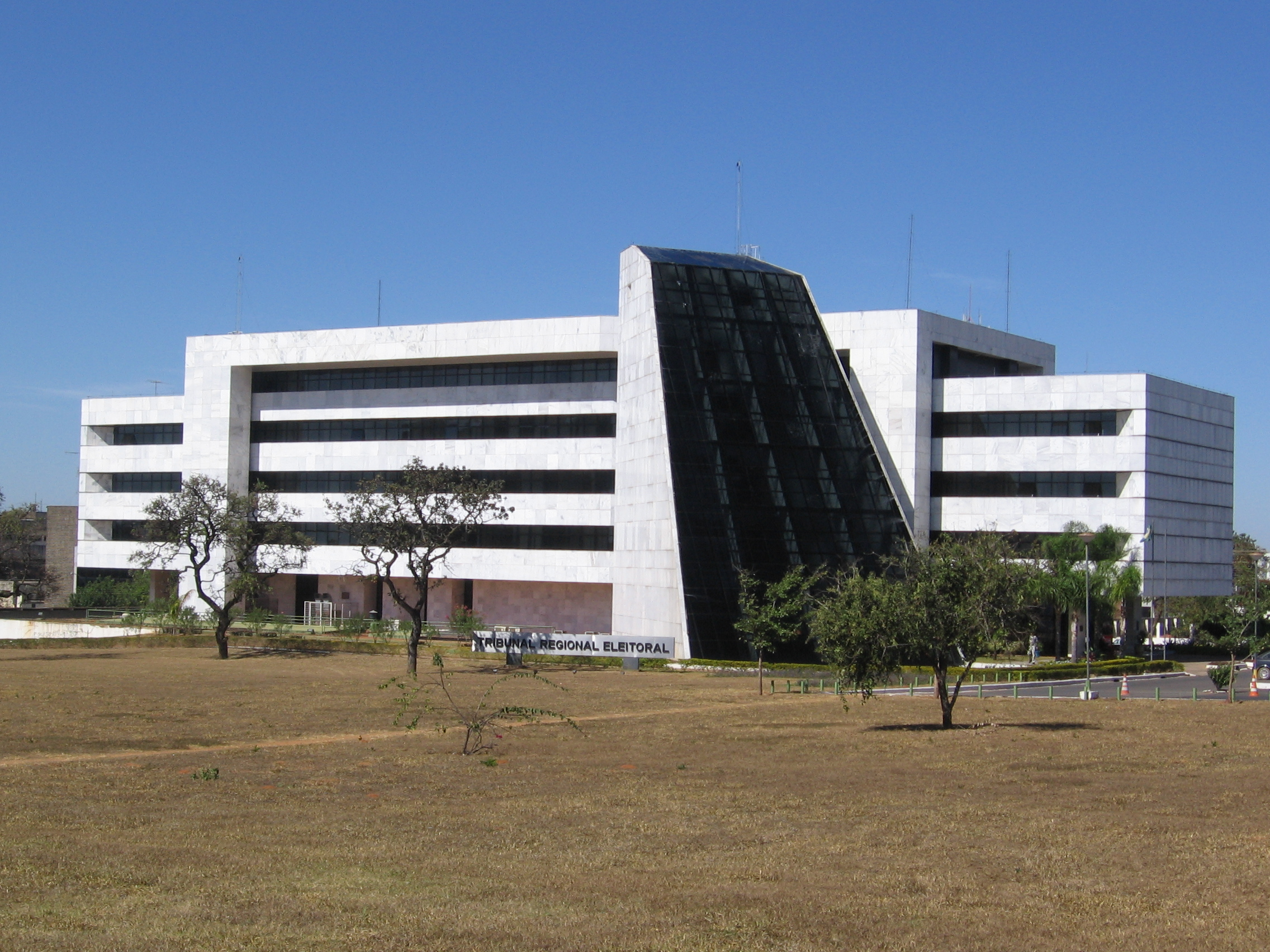 Vista do edifício-sede do Tribunal Regional Eleitoral do Distrito Federal (Brasil)